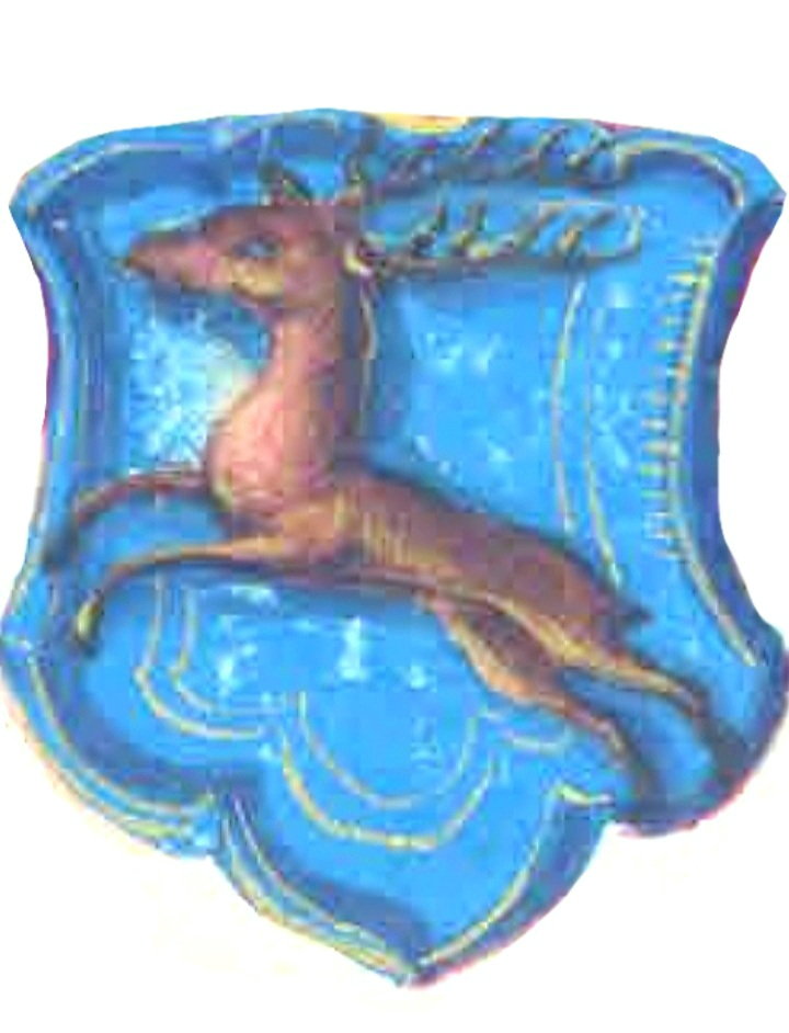 Wappen derer kurbrandenburgisch-preußischen von Cosel, 1667 in den Reichsadel erhoben, 1668 in Kurbrandenburg anerkannt.